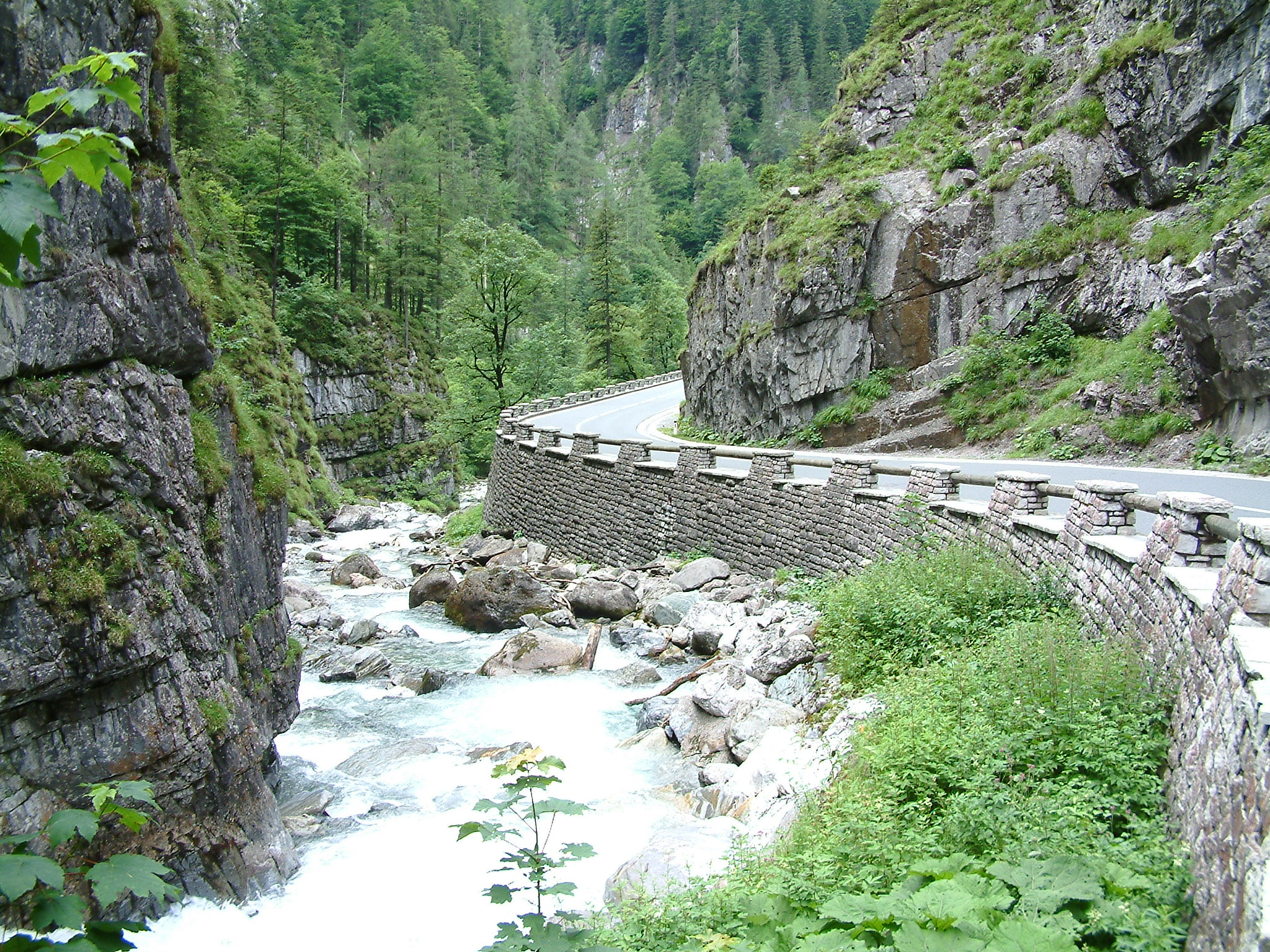 Austrian Alps, Katschberg.